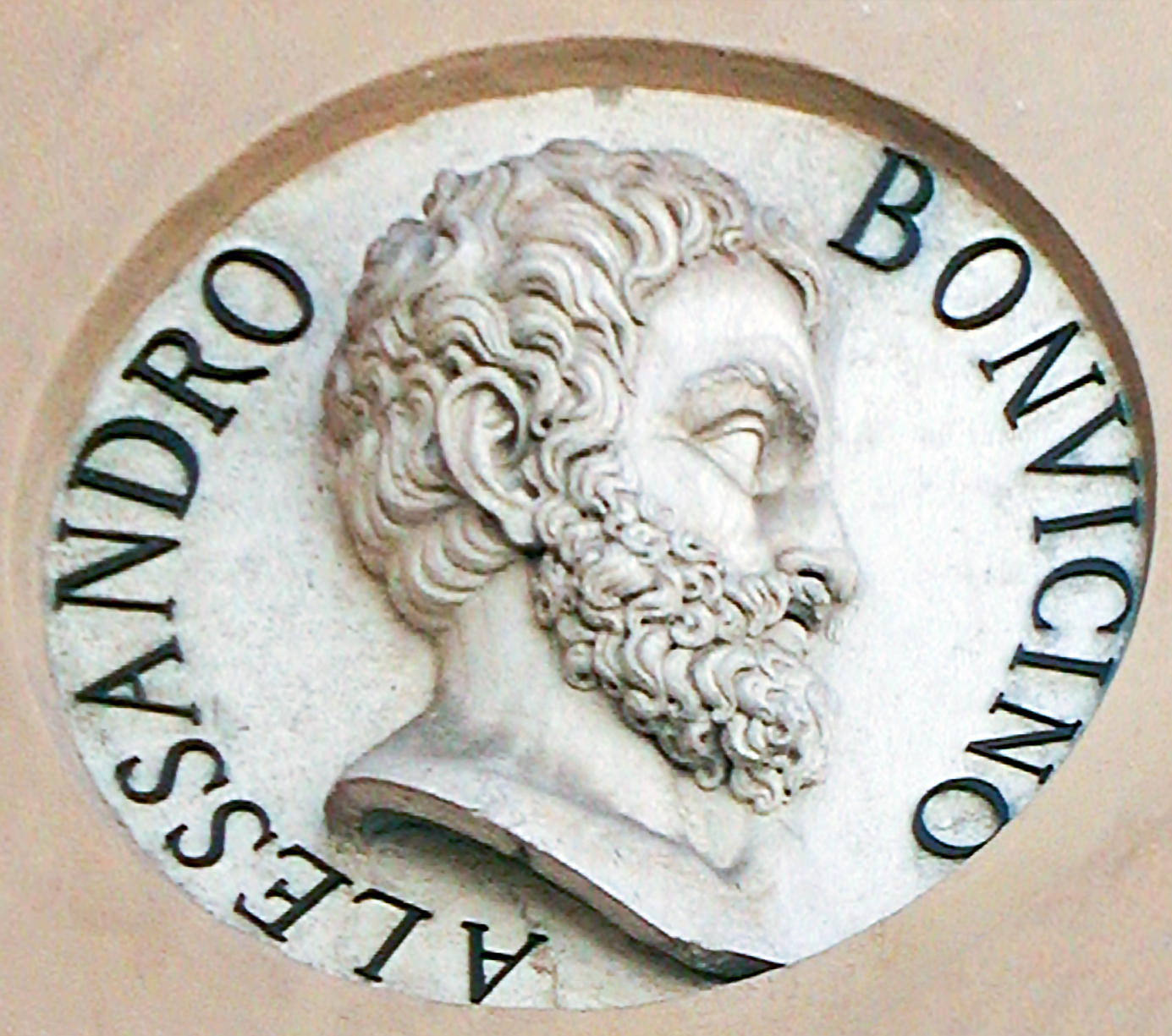 Bildnis von Alessandro Bonvicino (Maler aus Brescia), in Brescia.